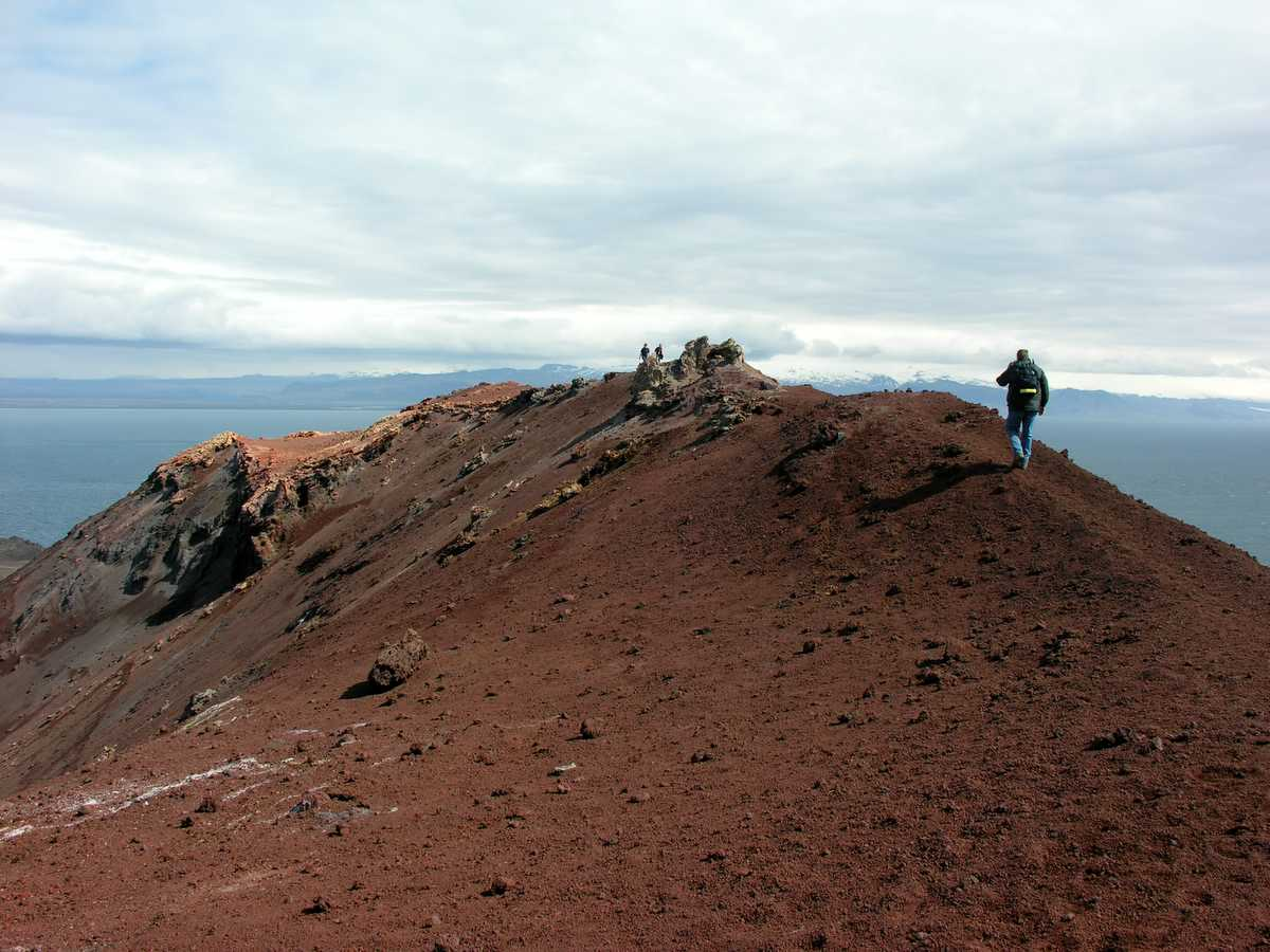 Vestmannaeyjar